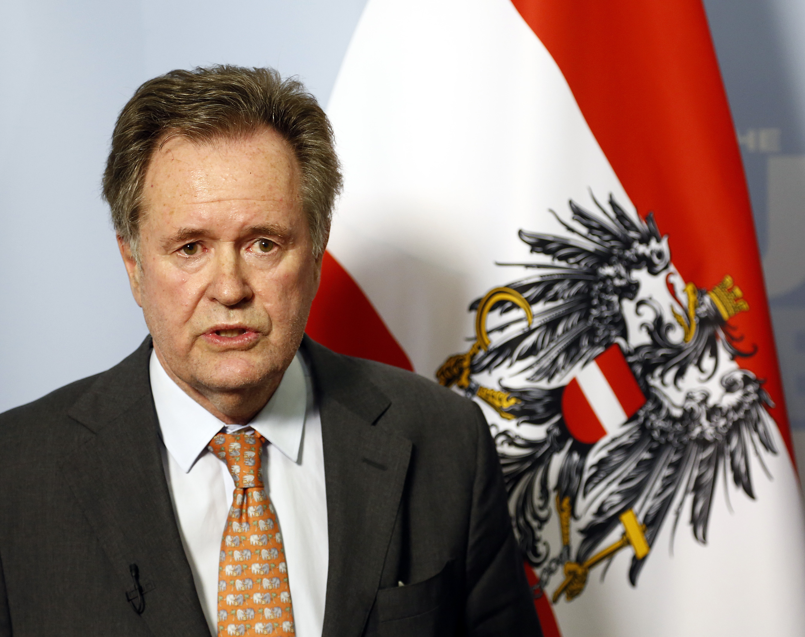 Statement von Generalsekretär Johannes Kyrle zur Befreiung des im Jemen entführten Österreichers Dominik N. und zwei weiteren Geiseln aus Finnland. Aussenministerium, Wien, 09.05.2013, Foto: Dragan Tatic